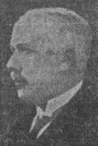 Arkitekten Frans Bertil Wallberg